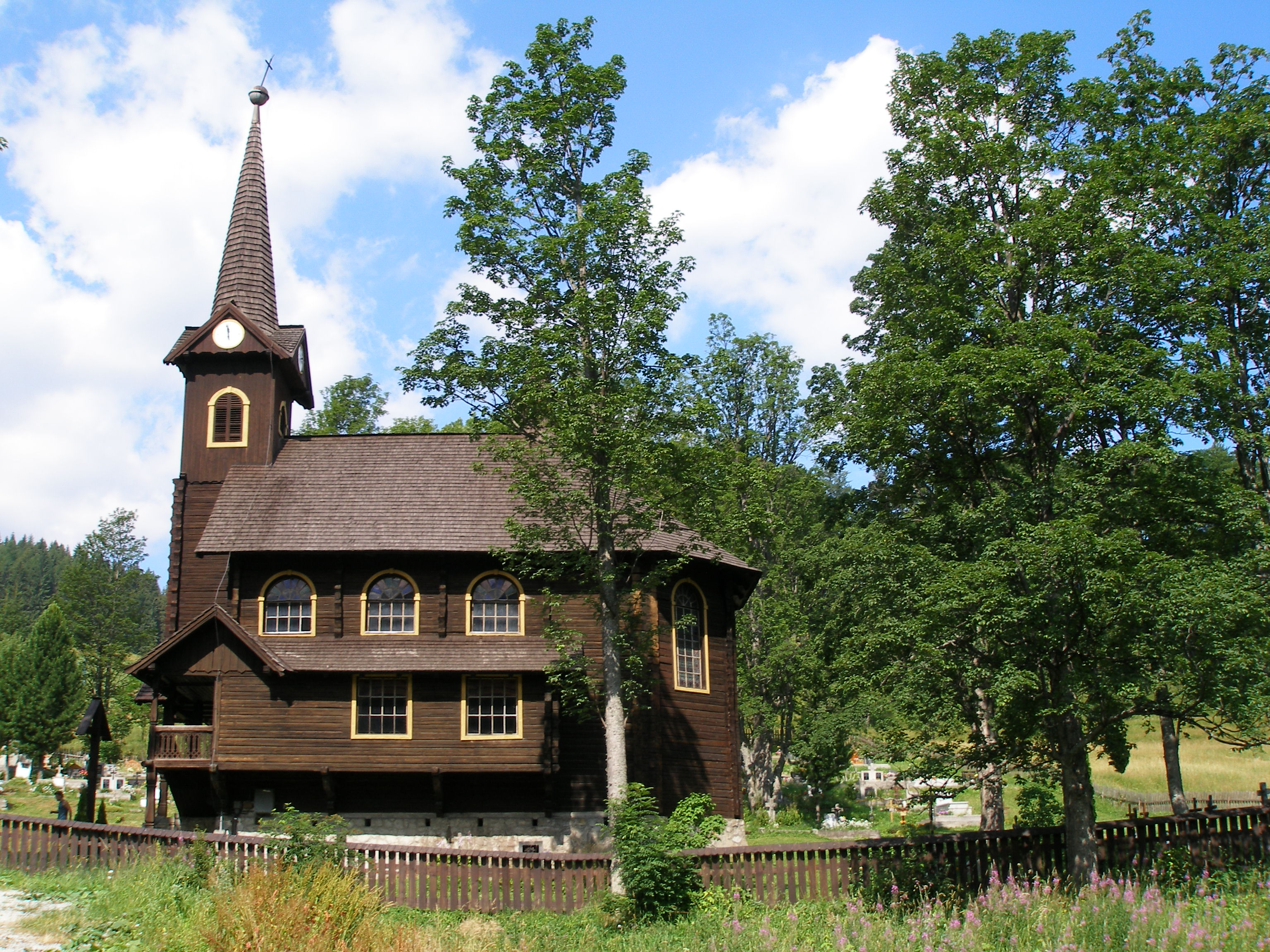 Drevený rímsko-katolícky kostol svätej Anny, Tatranská Javorina